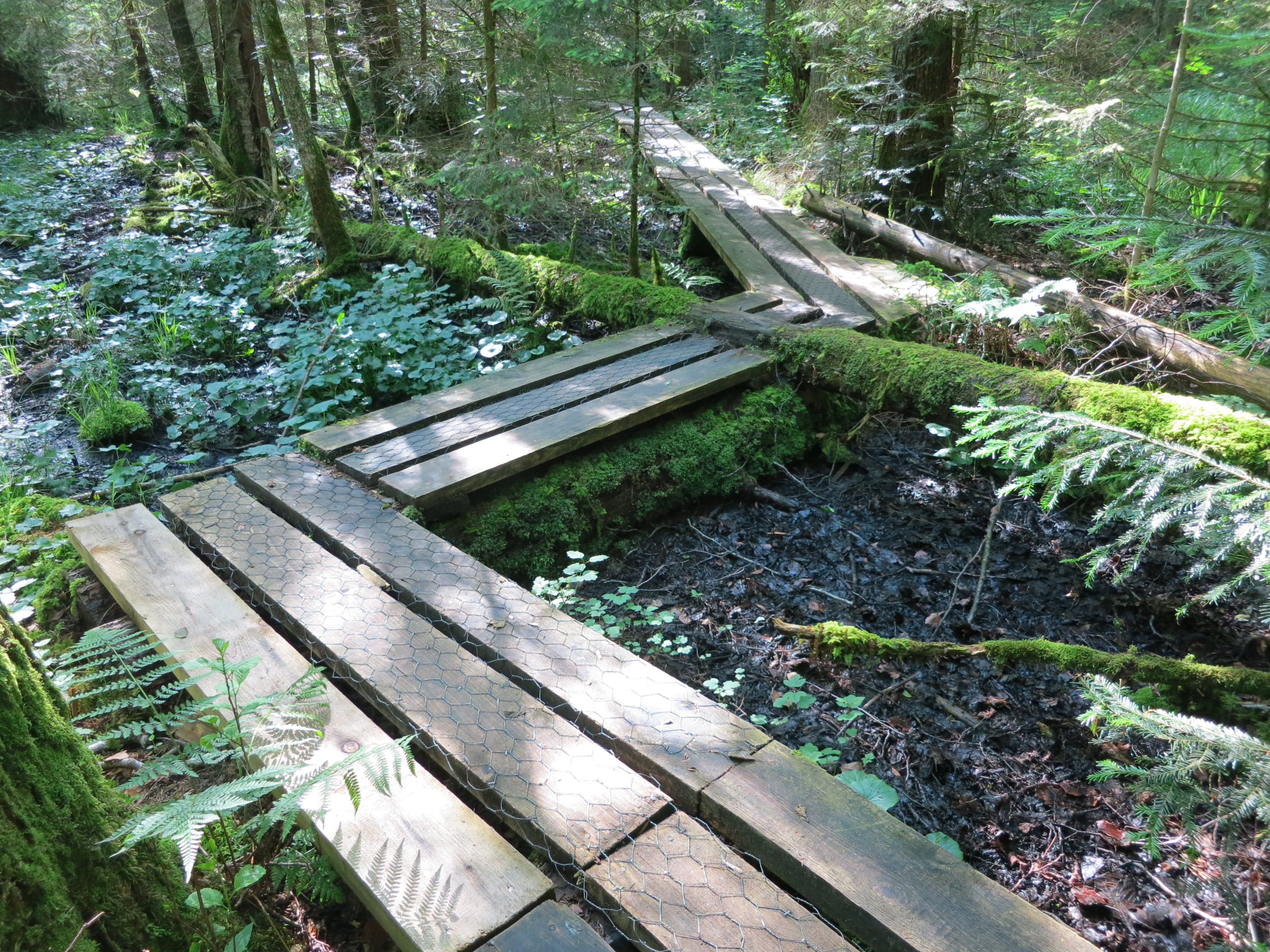 Wildnispark Zürich, Sihlwald ZH, Schweiz